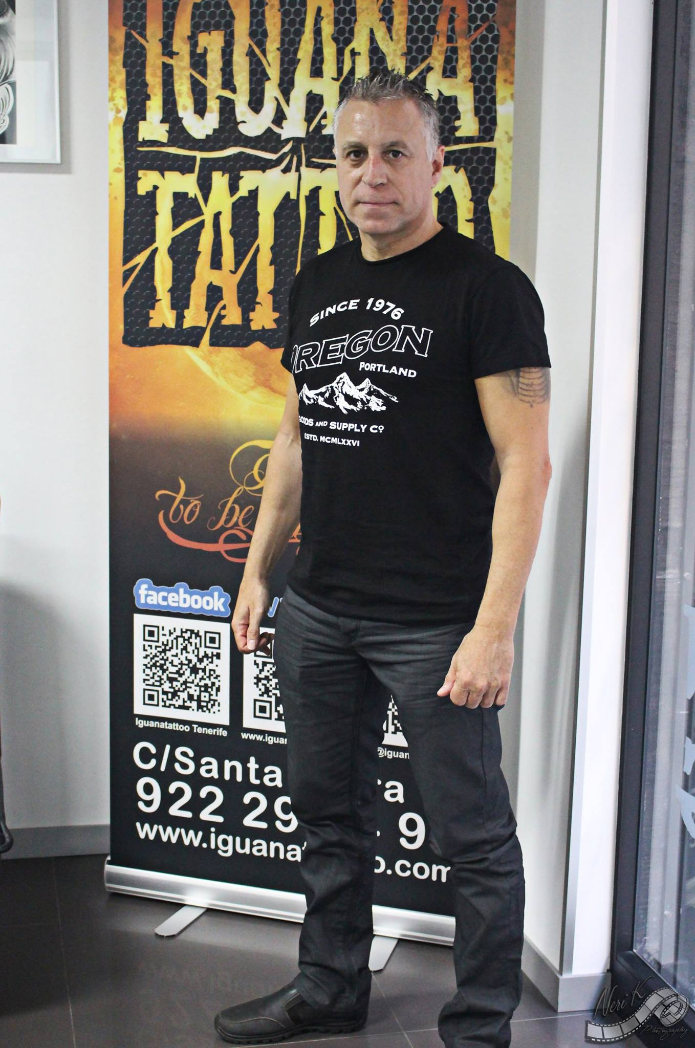 Esclavitud